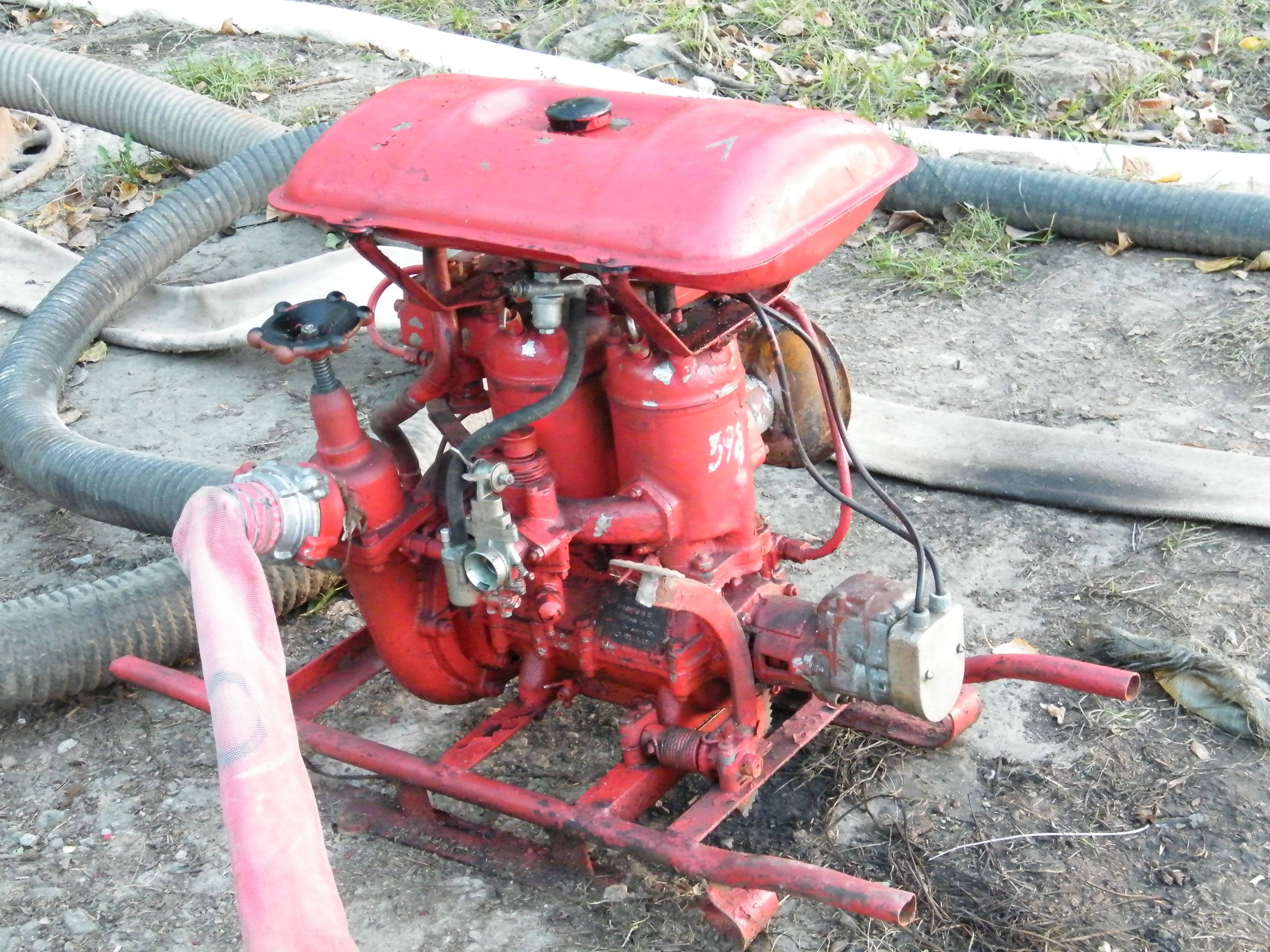 Пожарная помпа